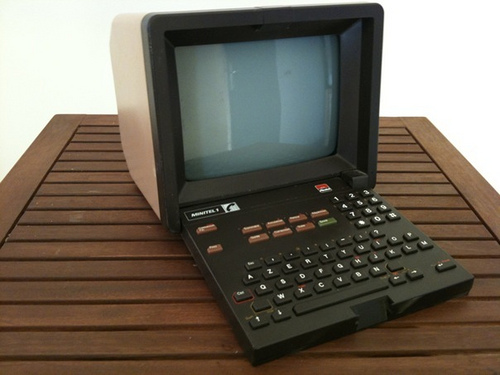 Minitel terminal.